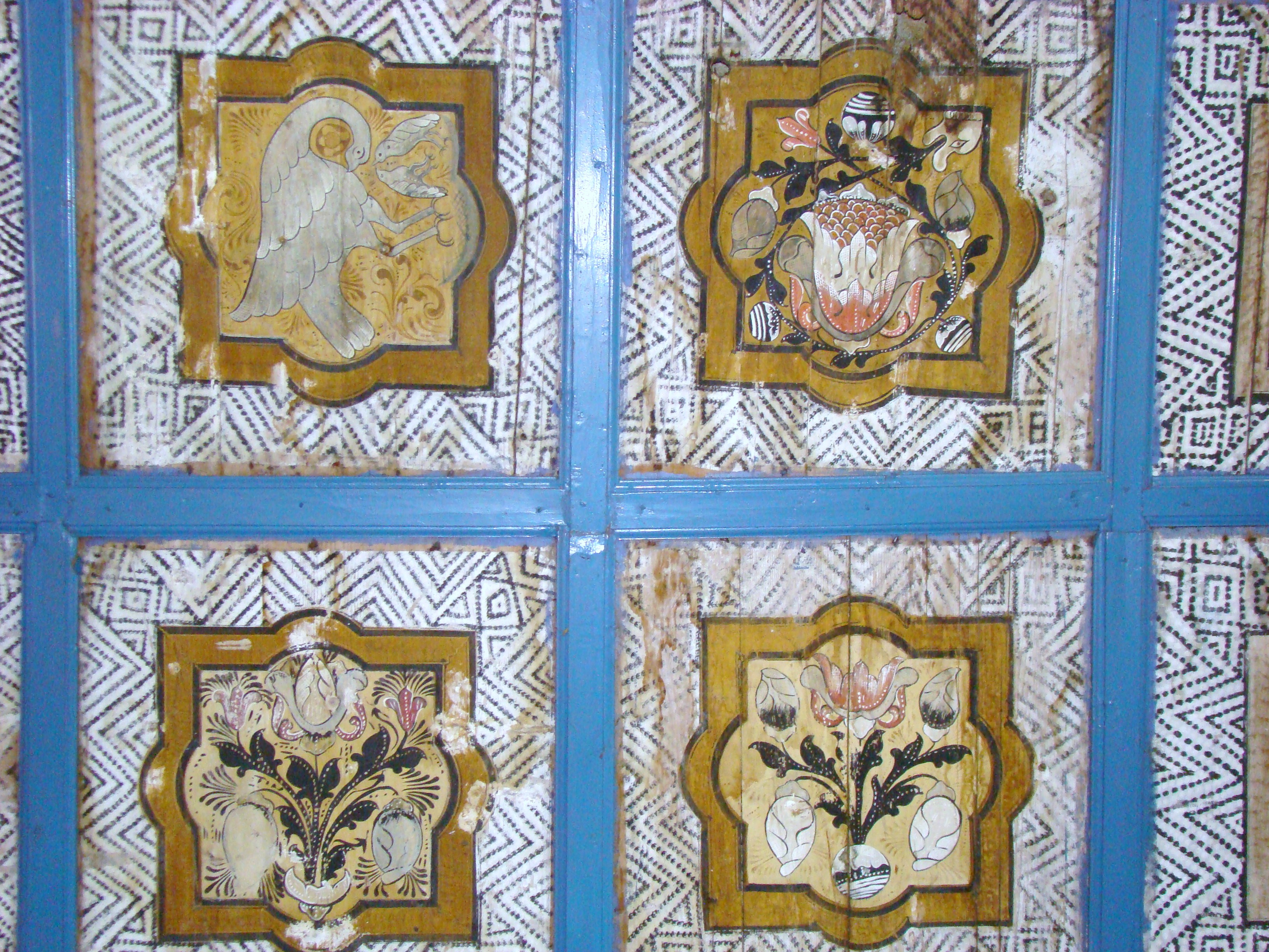 Biserica reformată, sat DUMBRAVA; comuna CĂPUŞU MARE, județul Cluj